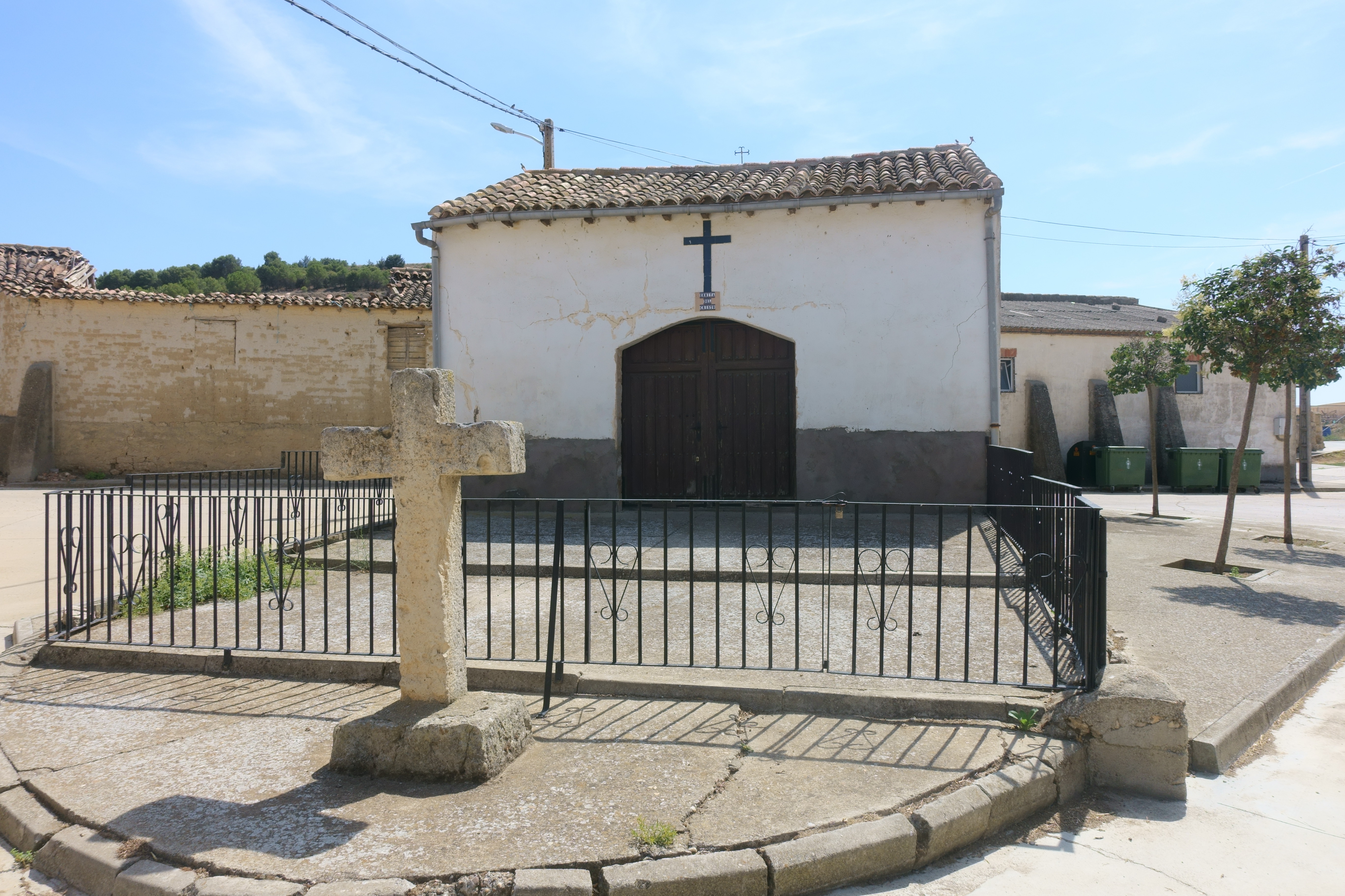 Ermita del Cristo, Valverde de Campos (Valladolid, España).